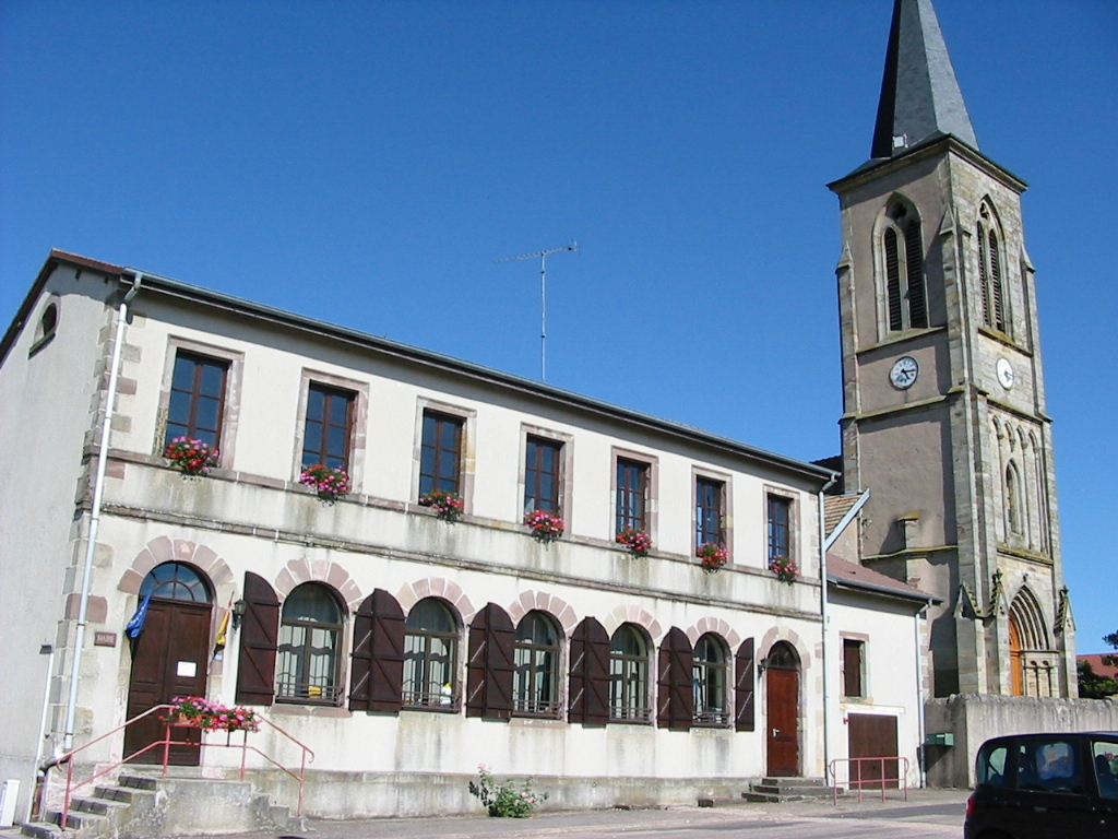 Clézentaine Mairie-école et église Commune du canton de Rambervillers (Vosges) Photo personnelle du 10 juillet 2006. Copyright © Christian Amet